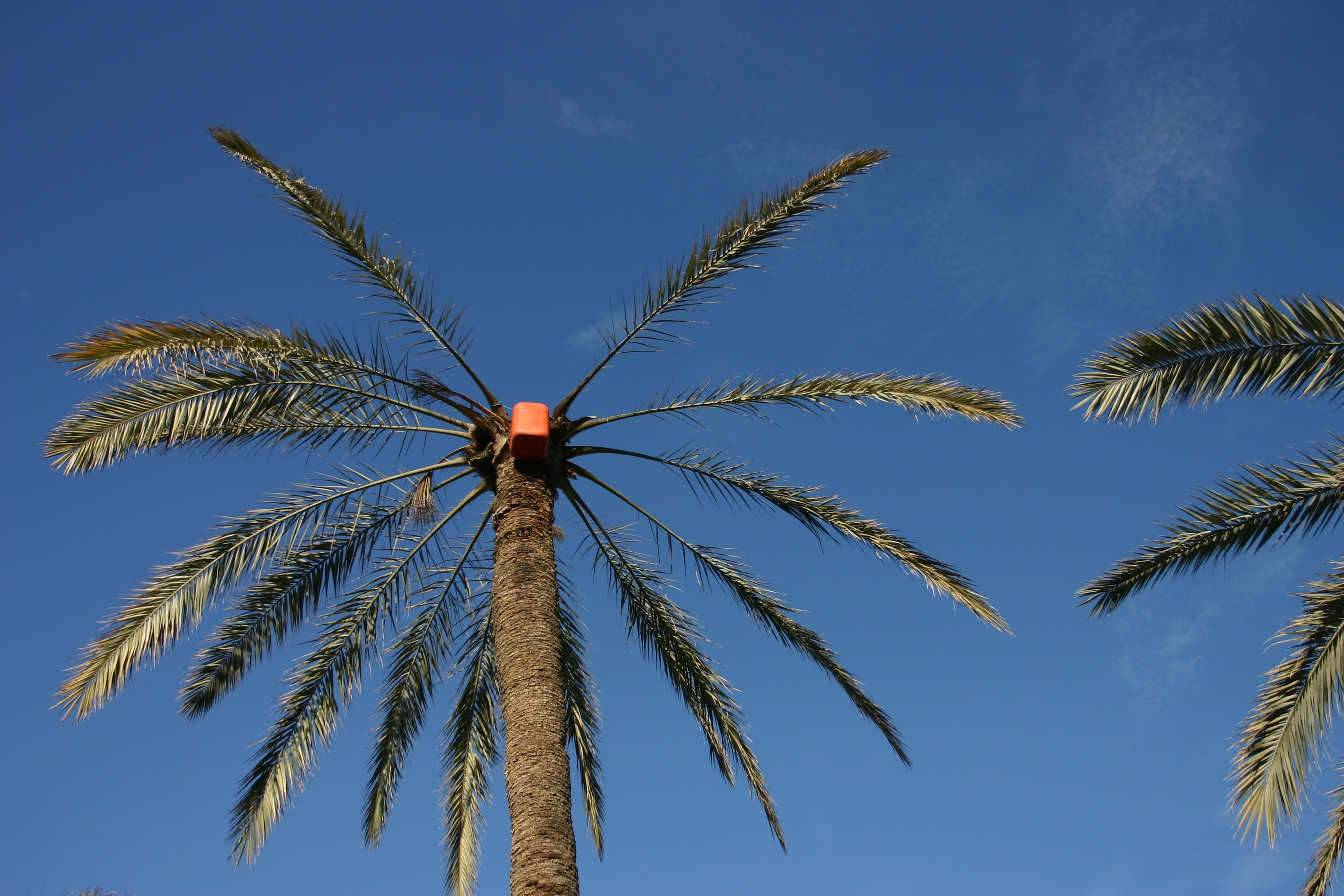 Photographie personnelle prise en 2004 représentant un palmier de l'oasis de Gabès (Tunisie) dont on récolte la sève liquide extraite de la partie supérieure du tronc appelé legmi, à la base d'une boisson sucrée et énergisante qui, fermentée, est fortement alcoolisée.